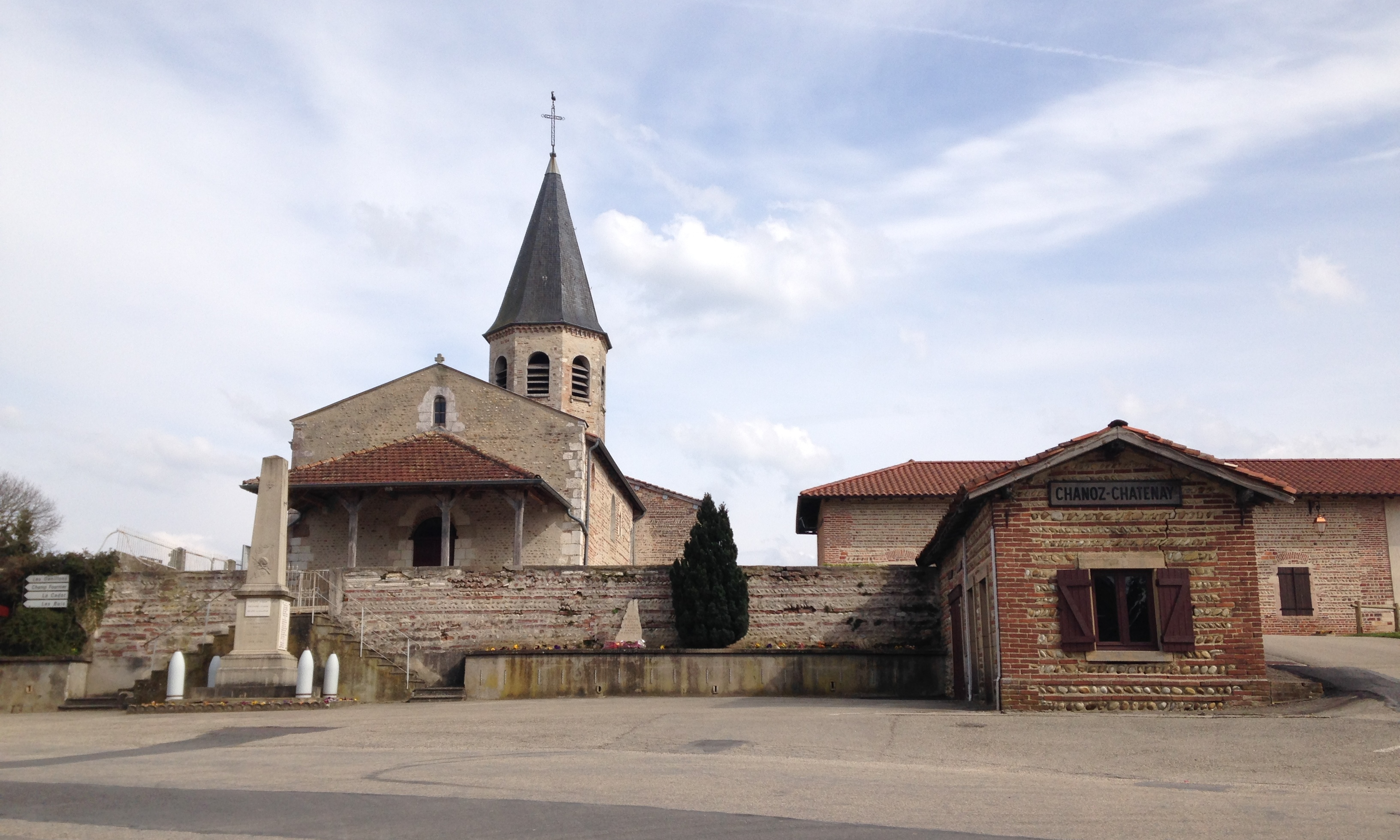 Église de Chanoz-Chatenay